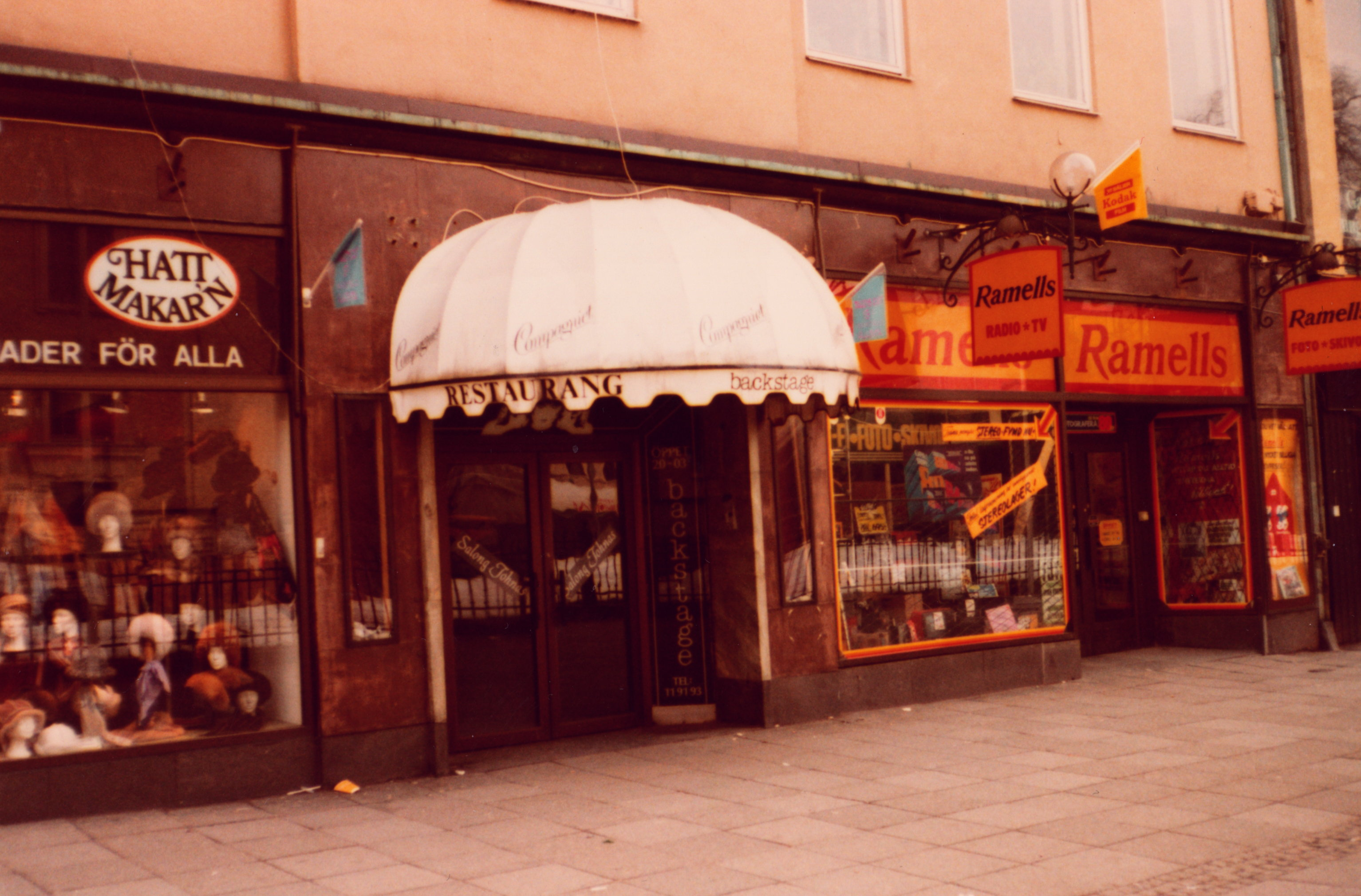 Ramells etc, Kungsgatan ca 1975